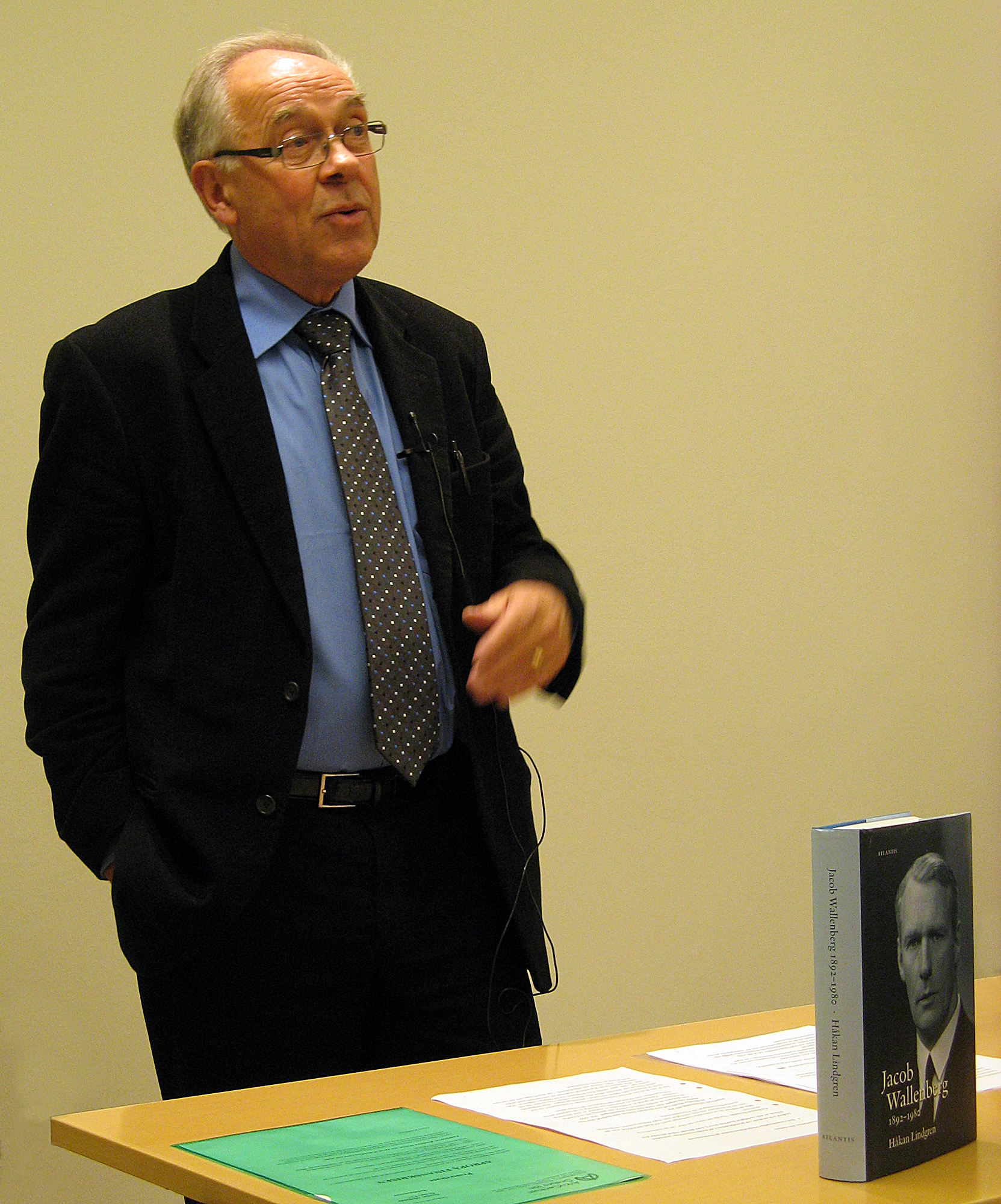 Svenske ekonomhistorikern Håkan Lindgren föreläser om sin bok om Jacob Wallenberg på ArkivCentrum Örebro län.